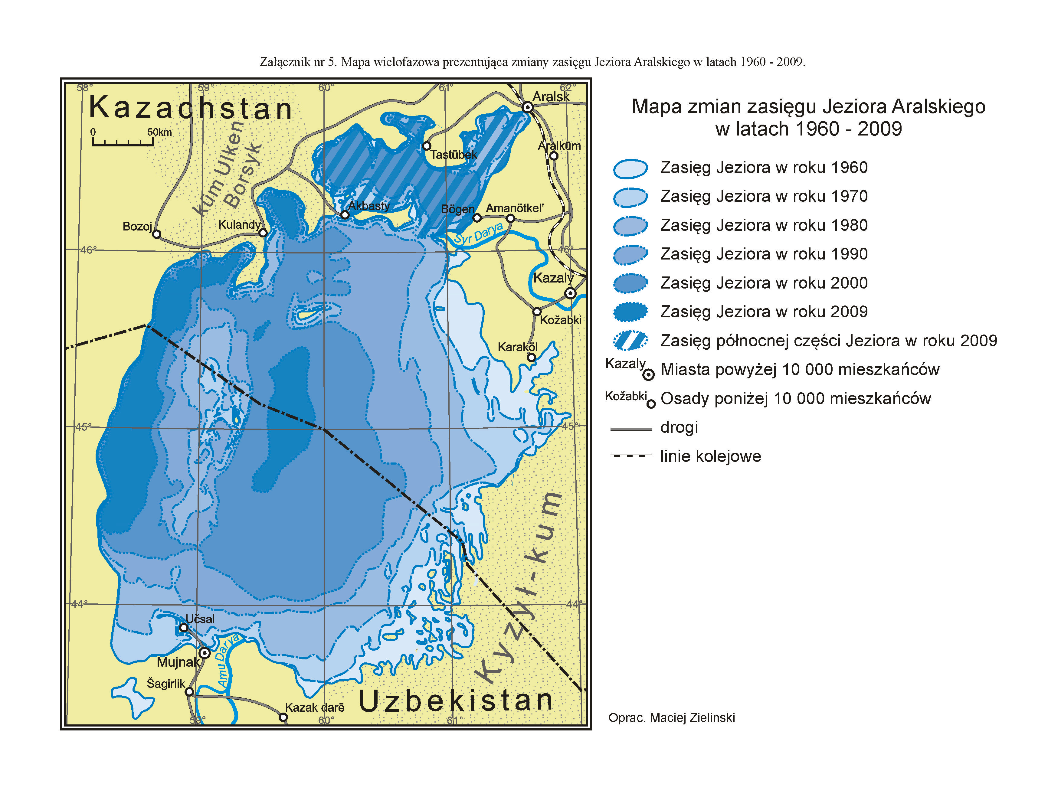 Mapa powstała jako uzupełnienie do animowanej mapy zmian zasięgu Jeziora Aralskiego, której poświęciłem pracę magisterską. Zredagowano w oparciu o trójwymiarowy model misy Jeziora Aralskiego, stworzony na podstawie radzieckich map w skali 1:200 000 i 1:500 000. Opublikowano w: Zieliński M., 2014, Animowana mapa zmian zasięgu Jeziora Aralskiego - koncepcja, prototyp, ewaluacja, Praca magisterska, Uniwersytet Warszawski, Wydzial Geografii i Studiów Regionalnych, Zakład Kartografii Opracowano na podstawie danych kartograficznych i statystycznych.